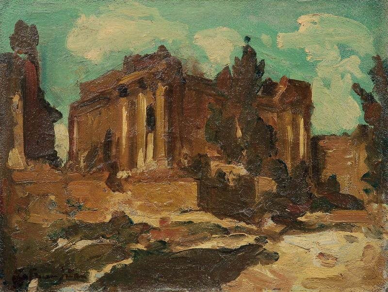 Baalbek, Sonnentempel, wohl vor 1911, Öl auf Leinwand. 27 x 35 cm